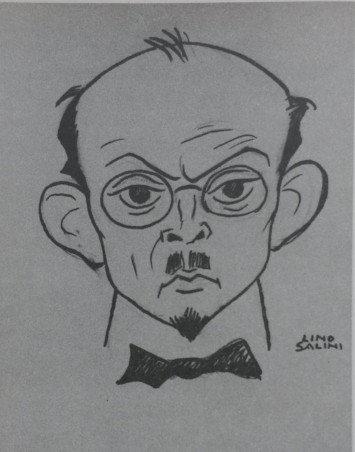 Darstellung von Georg Swarzenski durch Lino Salini